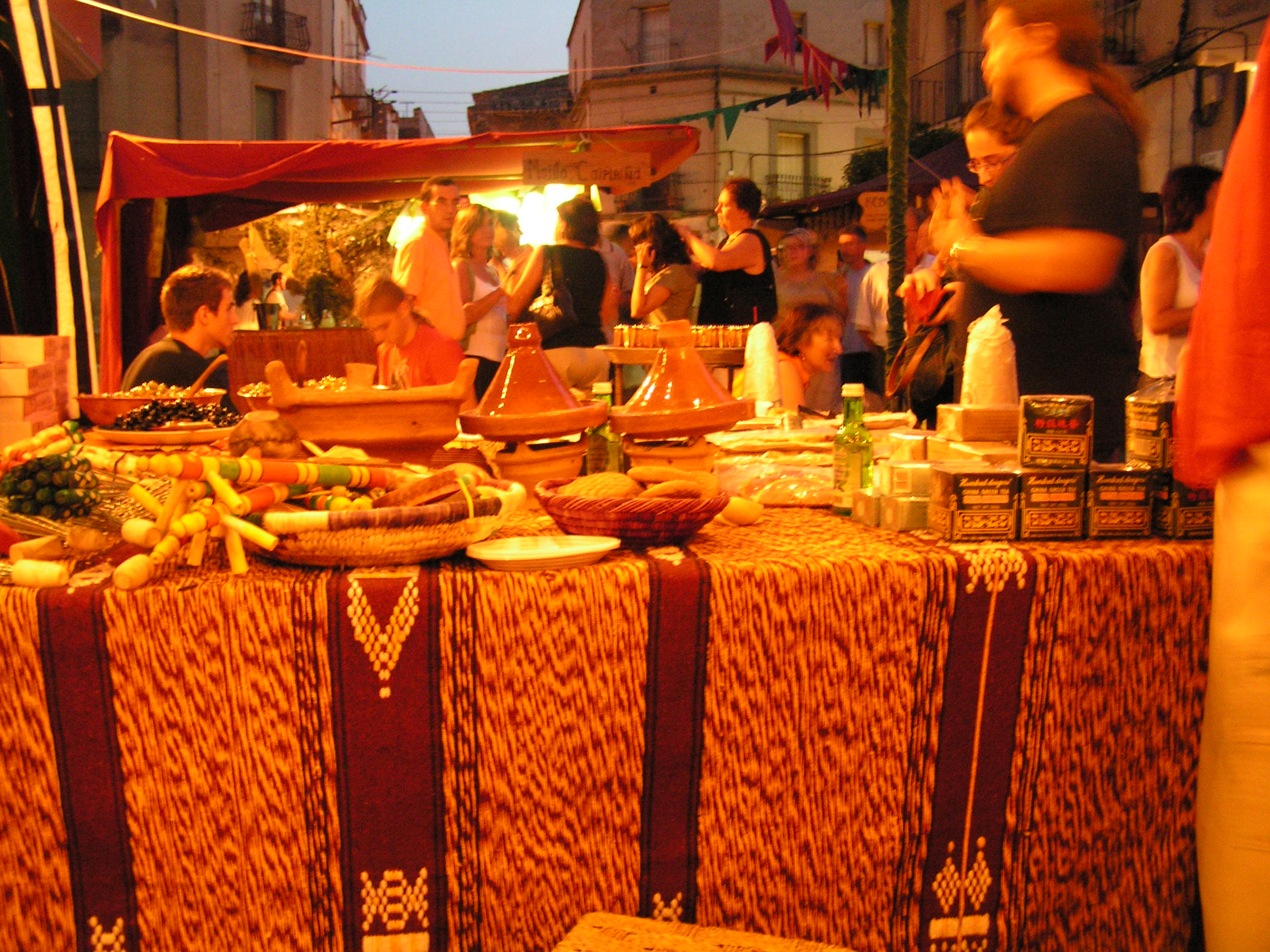 Unes pastetes àrabs